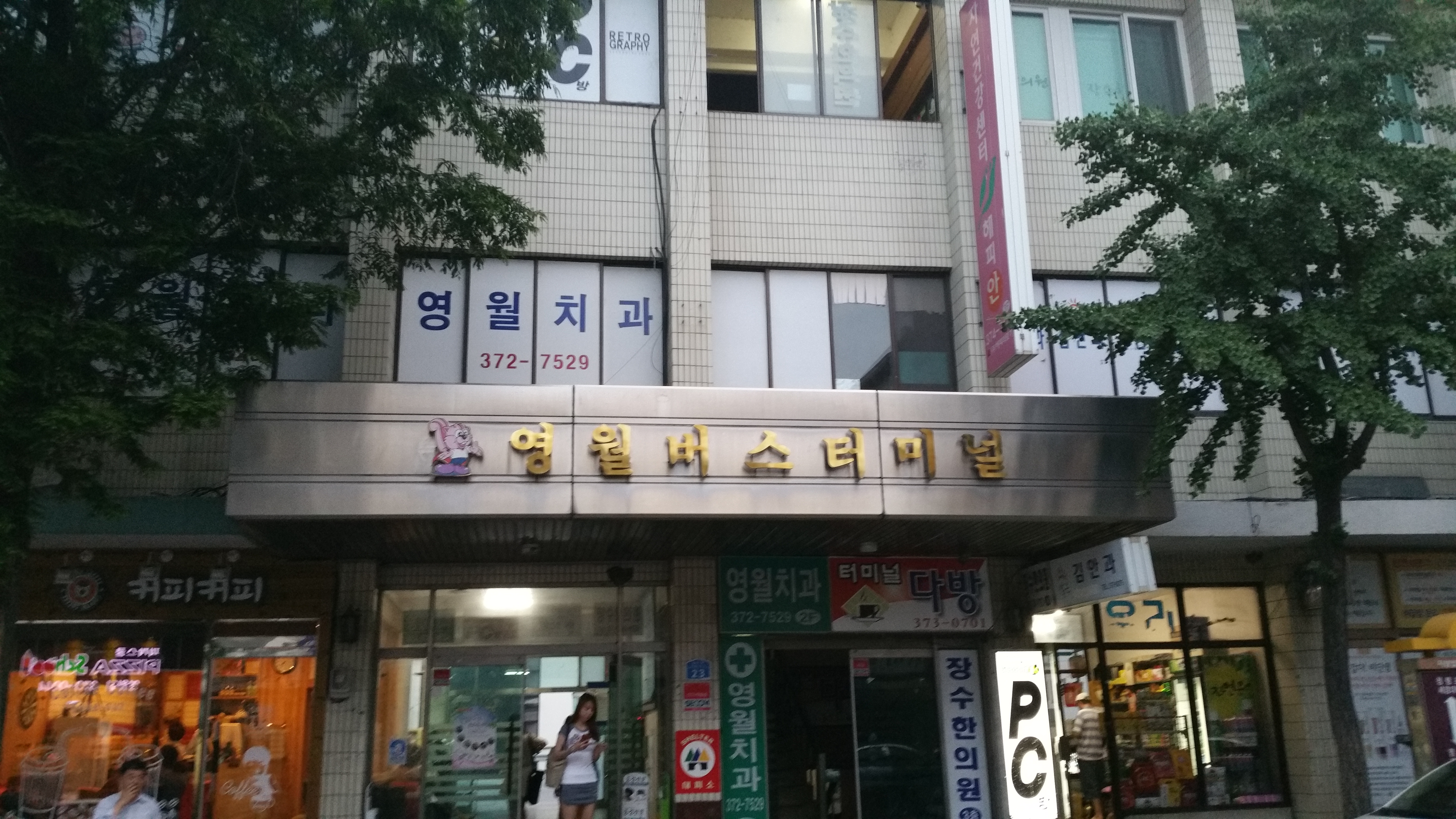 2016년 6월 12일에 촬영된 영월시외버스터미널 모습.